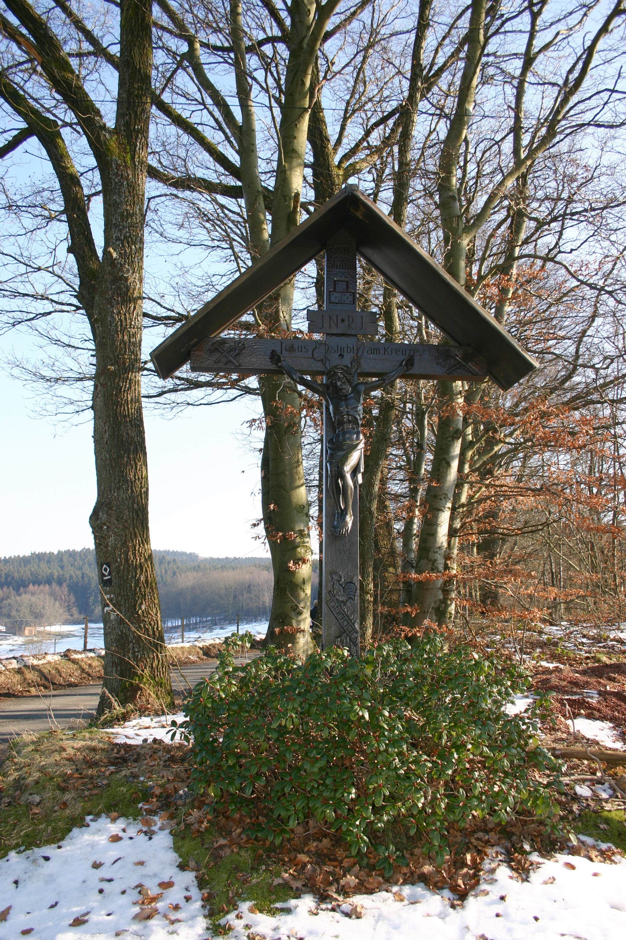 Kirche Kohlhagen Kreuzwegstation